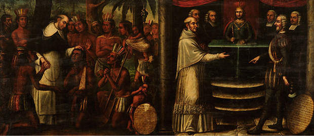 El héroe español Fray Bartolomé de las Casas. Controversia de Valladolid bestial de españoles a los indios